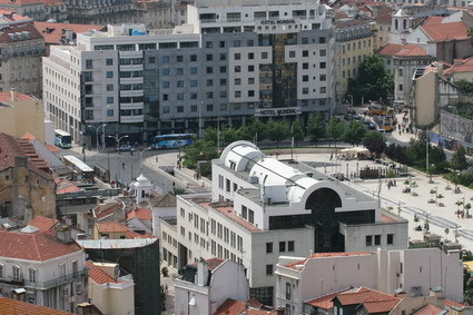 Praça de Martim Moniz